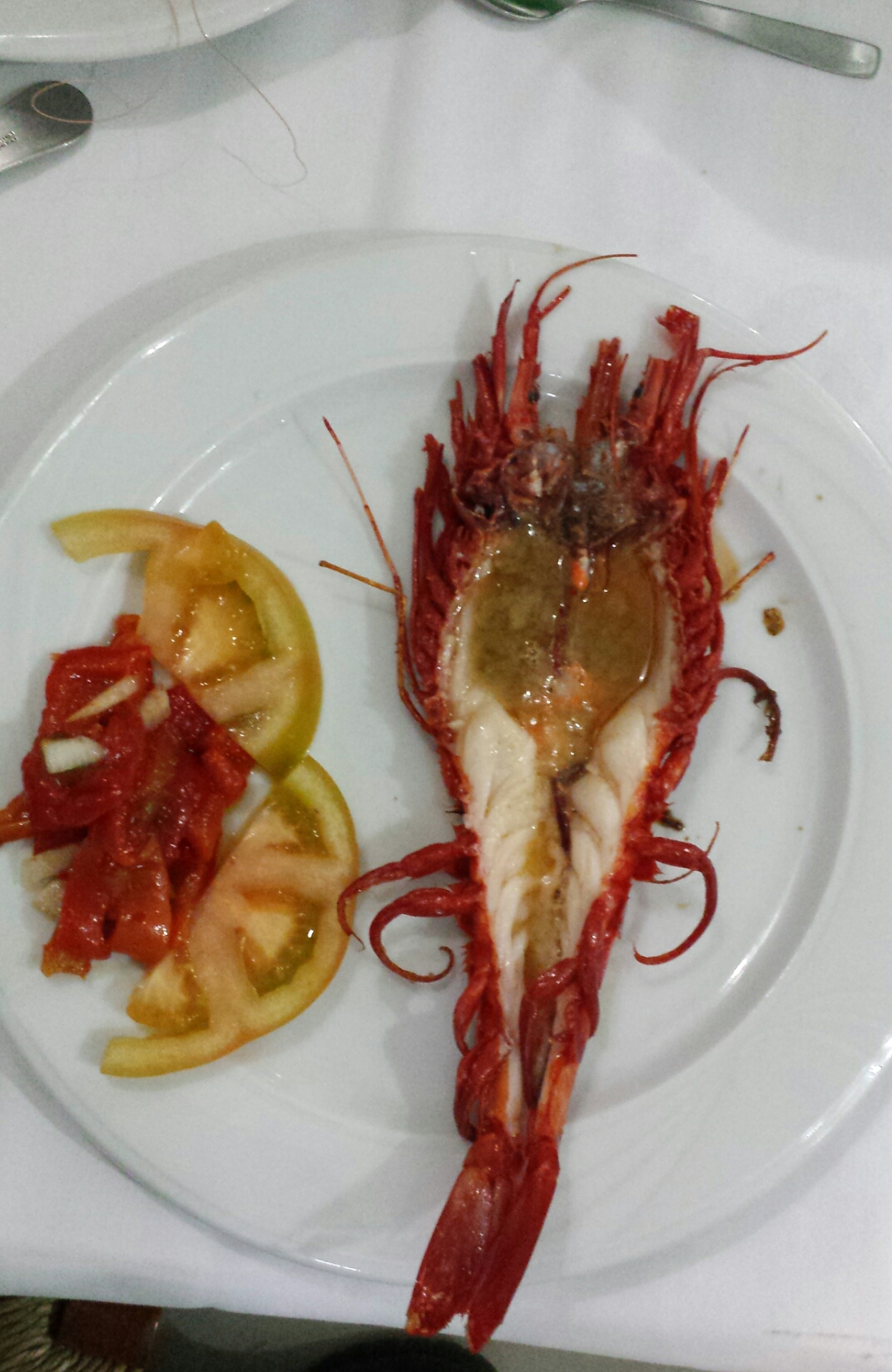 Carabinero en su jugo, Cádiz, España